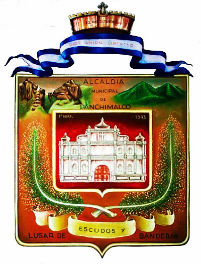 Sello Municipal de la Alcaldia de Panchimalco, San Salvador, El Salvador. C.A.